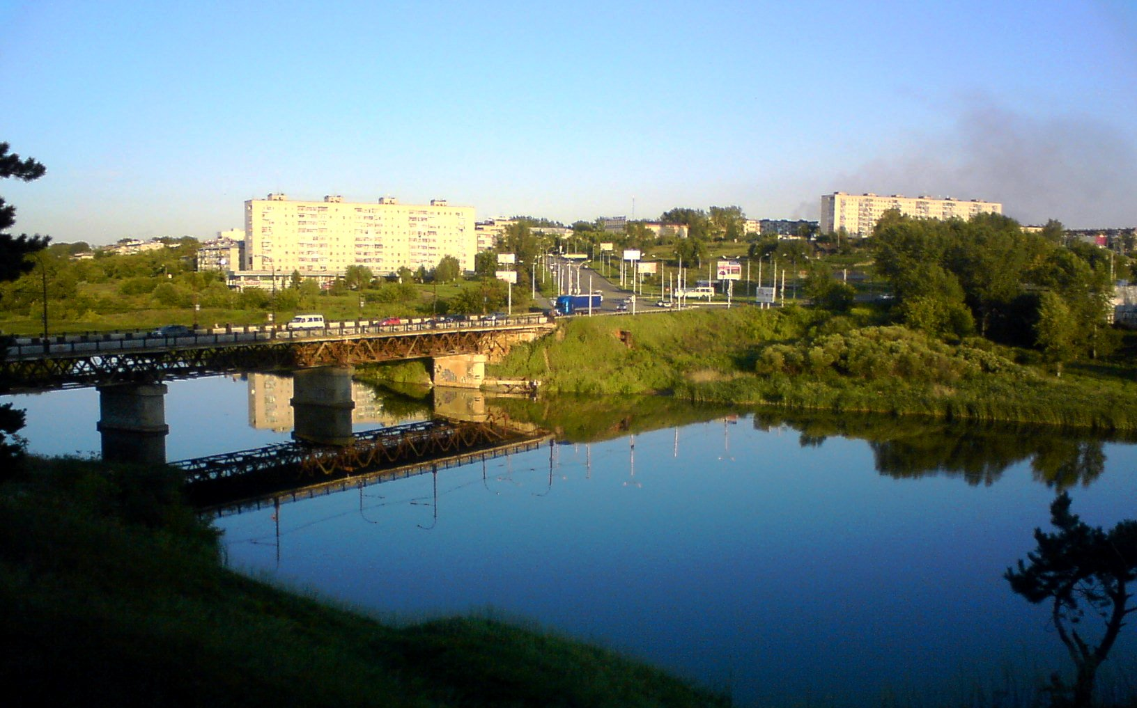 Вид на Байновский мост и Красногорский район